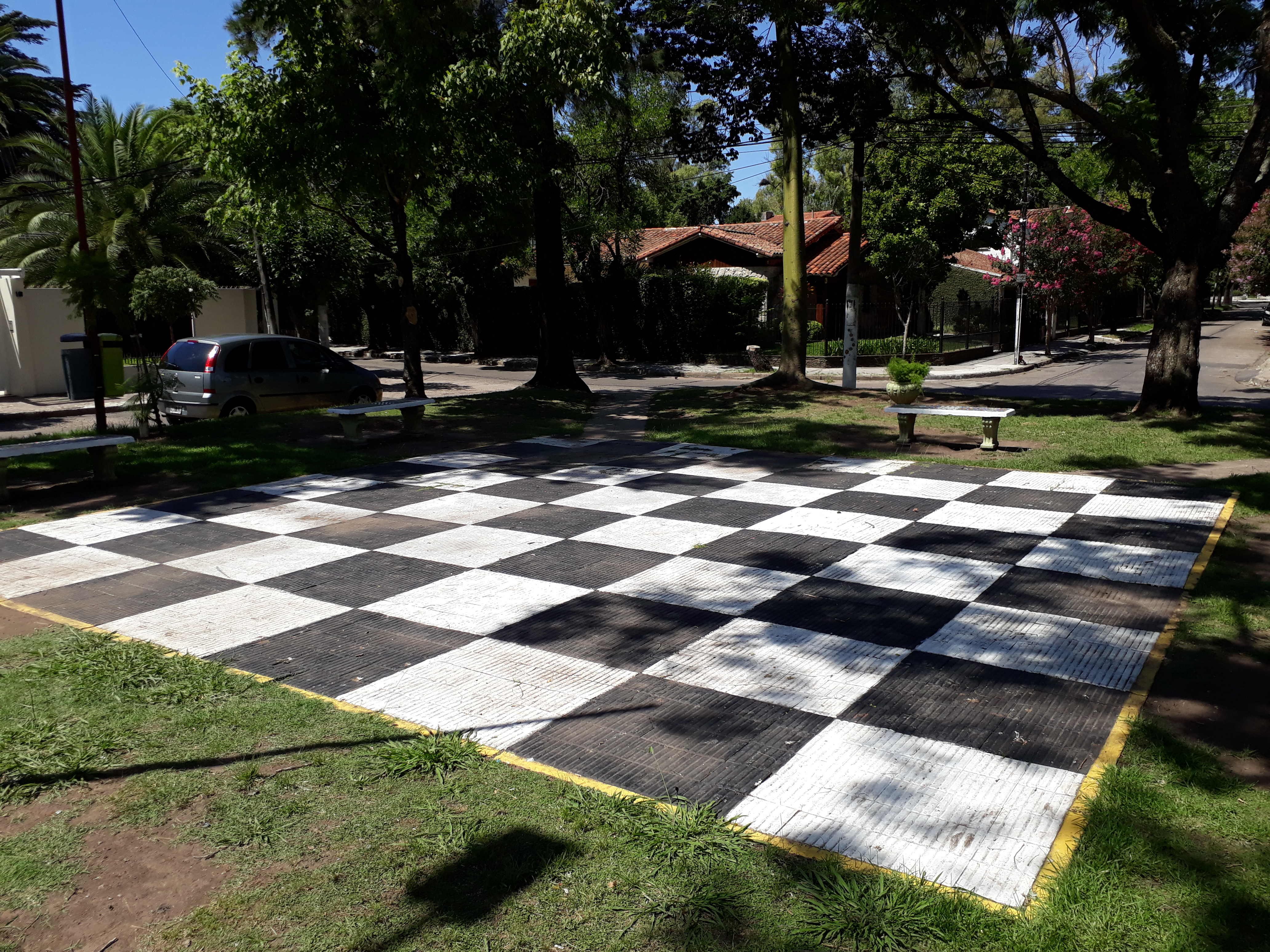 Plaza de los Ajedrecistas o del maestro de ajedrez "Leonardo Gette", desde 21.04.1990. Para los que vivimos desde principios de la década de los 60's: "La Placita". También el equipo de fútbol "Placita", en la década de los 70's, dirigido por Jorge Mórtola: Alejandro Ruiz; Alberto, Patricio y Gustavo Williams; Eduardo y Daniel Farré; Fernando y Marcelo Rossi; Gabriel Díaz; Fernando T. de Gorocica; Javier Malosetti. Ciudad Jardín Lomas de El Palomar.